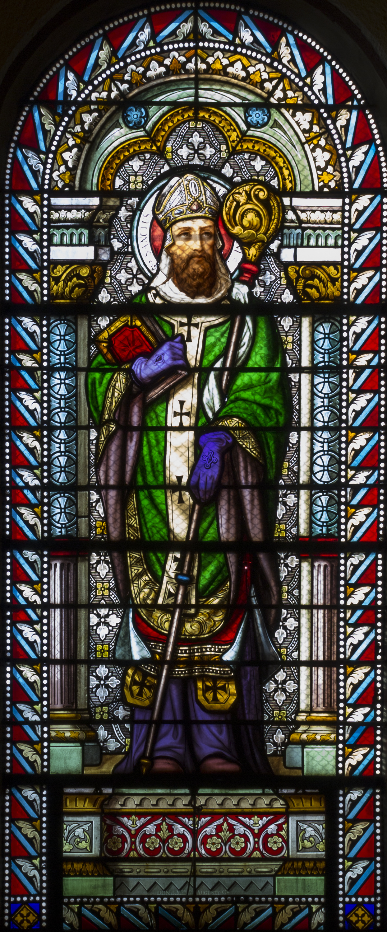 Vitrail de saint Augustin dans l'église Saint-Denis-de-la-Croix-Rousse de Lyon.